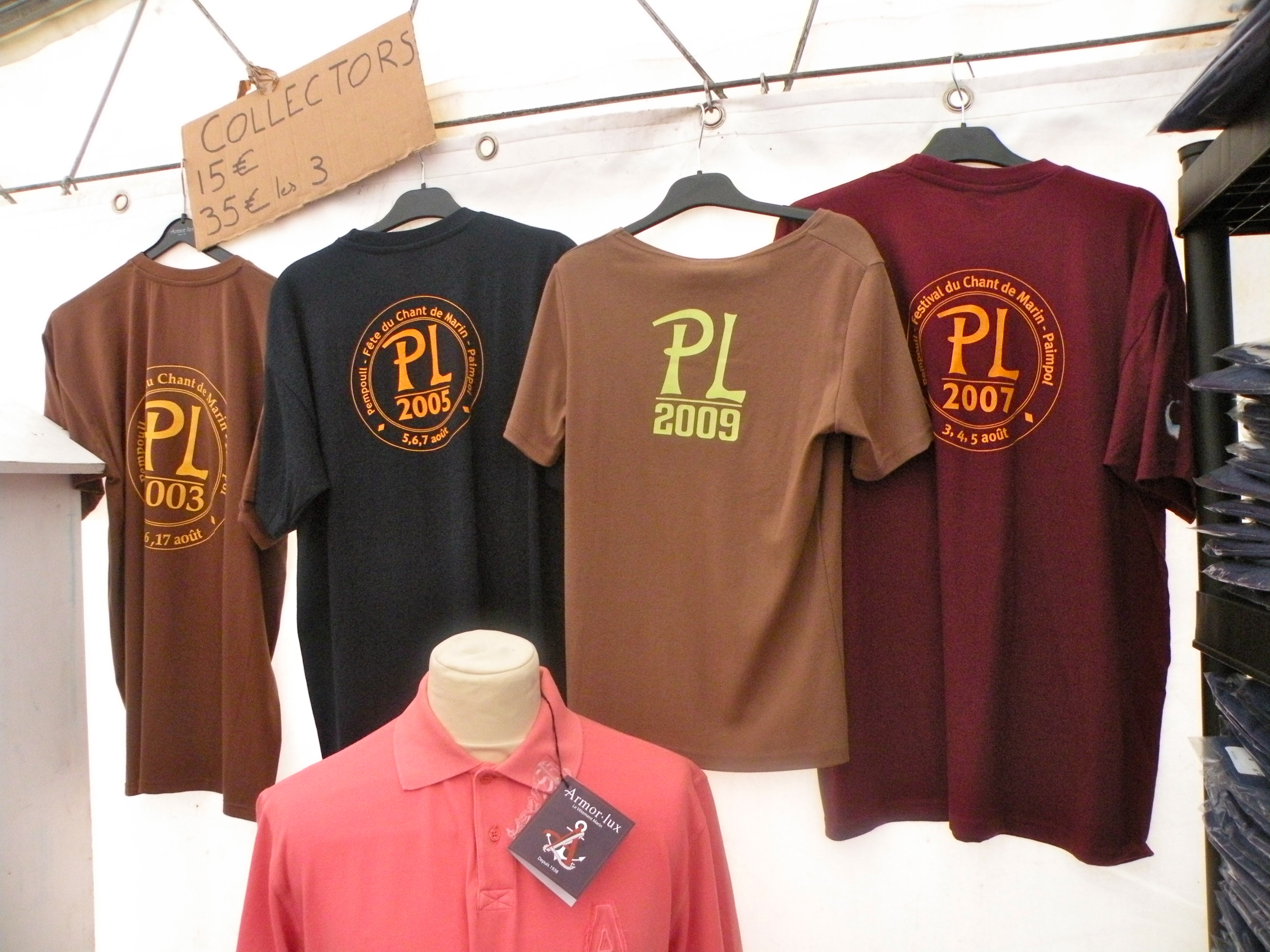 Stand des t-shirts logotés de chaque édition du festival du chant de marin de Paimpol, lors de l'édition 2011, fabriqués par le partenaire Armor-Lux.